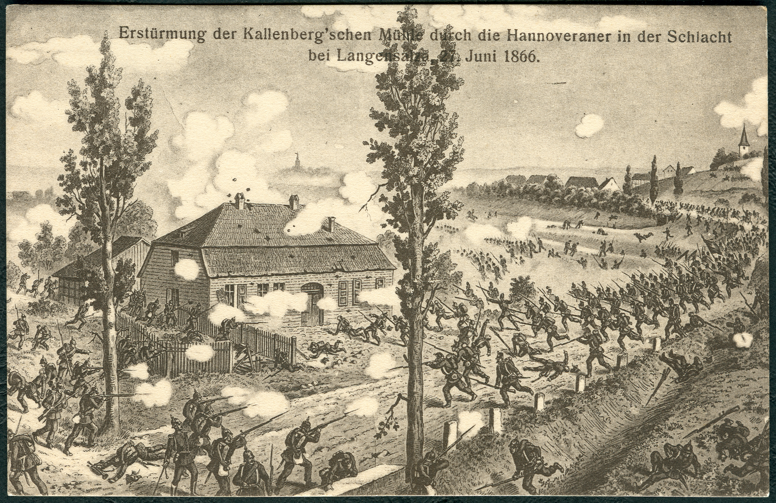 Bildseite der Ansichtskarte aus dem Verlag von Hermann Beltz mit einer Zeichnung von Otto Handlow, übertitelt „Erstürmung der Kallenberg'schen Mühle durch die Hannoveraner in der Schlacht bei Langensalza, 27. Juni 1866“ ...